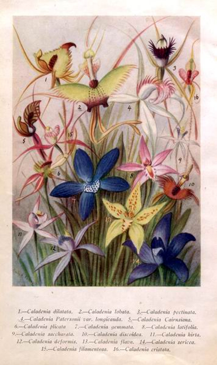 Plate I of Emily Pelloe: "West Australian Orchids" Species in this plate 1 Caladenia dilatata 2 Caladenia lobata 3 Caladenia pectinata 4 Caladenia patersonii var longicauda (=Caladenia longicauda) 5 Caladenia cairnsiana 6 Caladenia plicata 7 Caladenia gemmata (= Cyanicula gemmata) 8 Caladenia latifolia 9 Caladenia saccharata (= Ericksonella saccharata) 10 Caladenia discoidea 11 Caladenia hirta 12 Caladenia deformis (= Pheladenia deformis) 13 Caladenia flava 14 Caladenia sericea (= Cyanicula sericea) 15 Caladenia filamentosa 16 Caladenia cristata